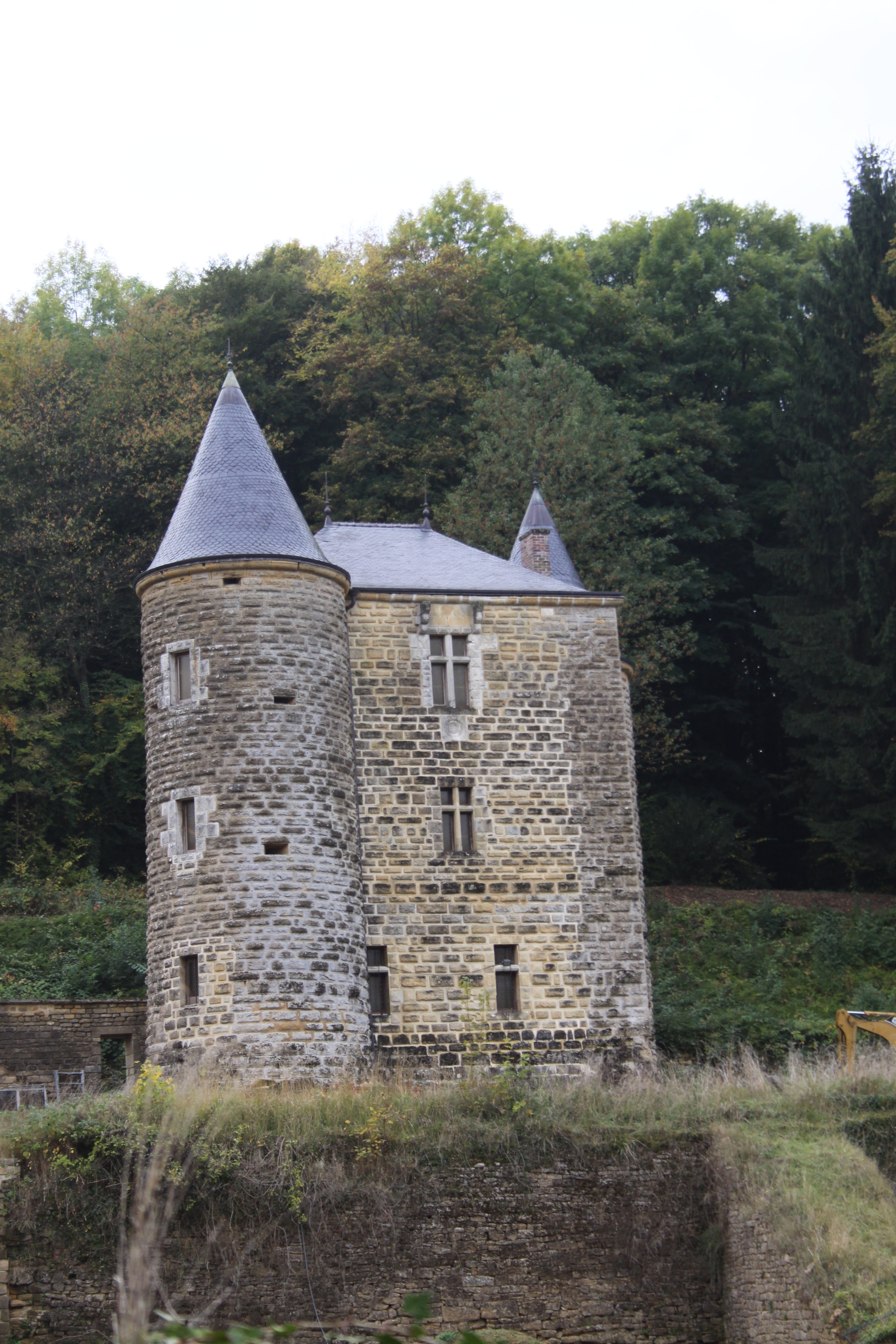 Château de Rocan, à Chéhéry (Ardennes, France)